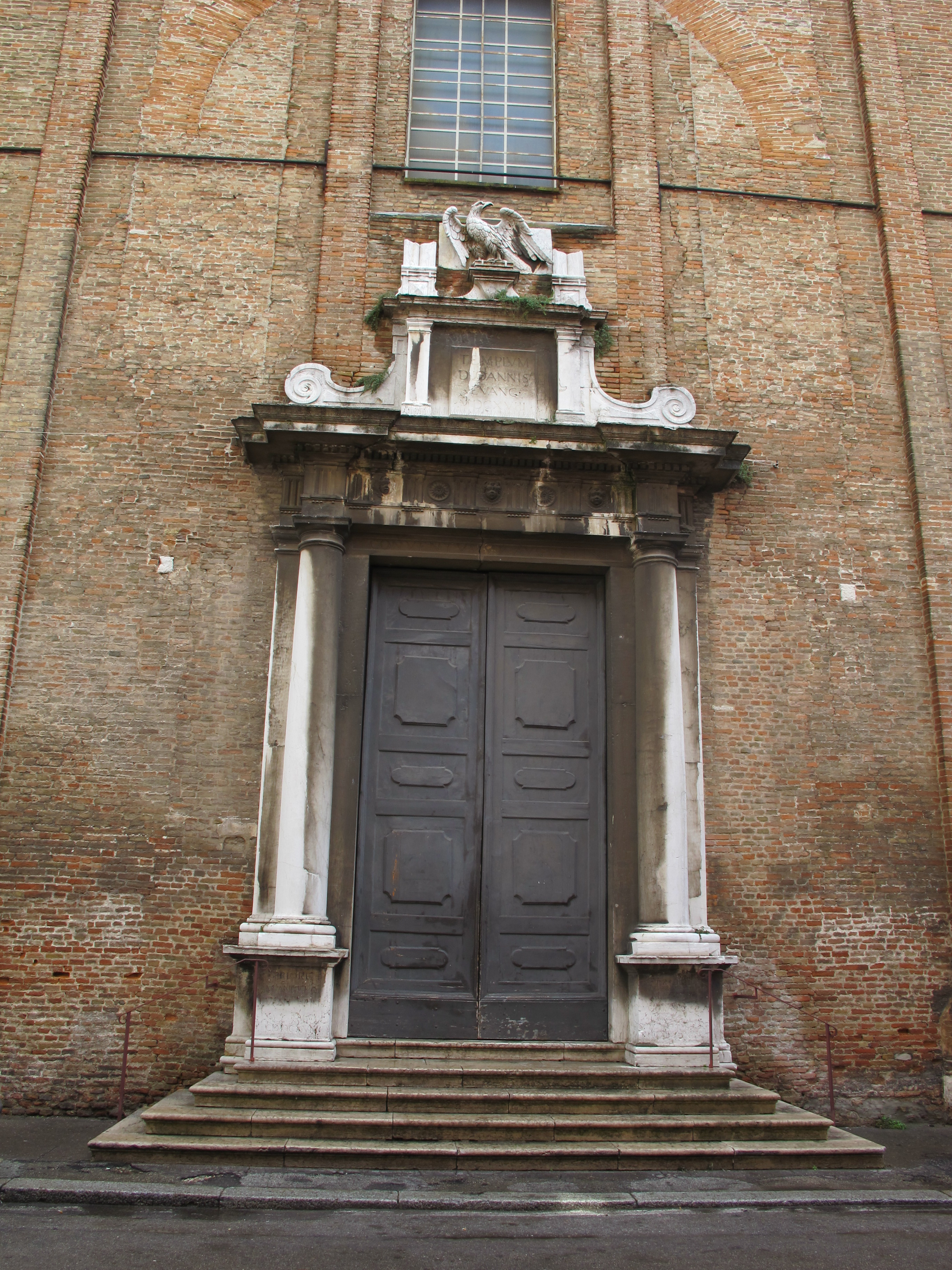 Chiesa S. Agostino - MIBAC This is a photo of a monument which is part of cultural heritage of Italy.